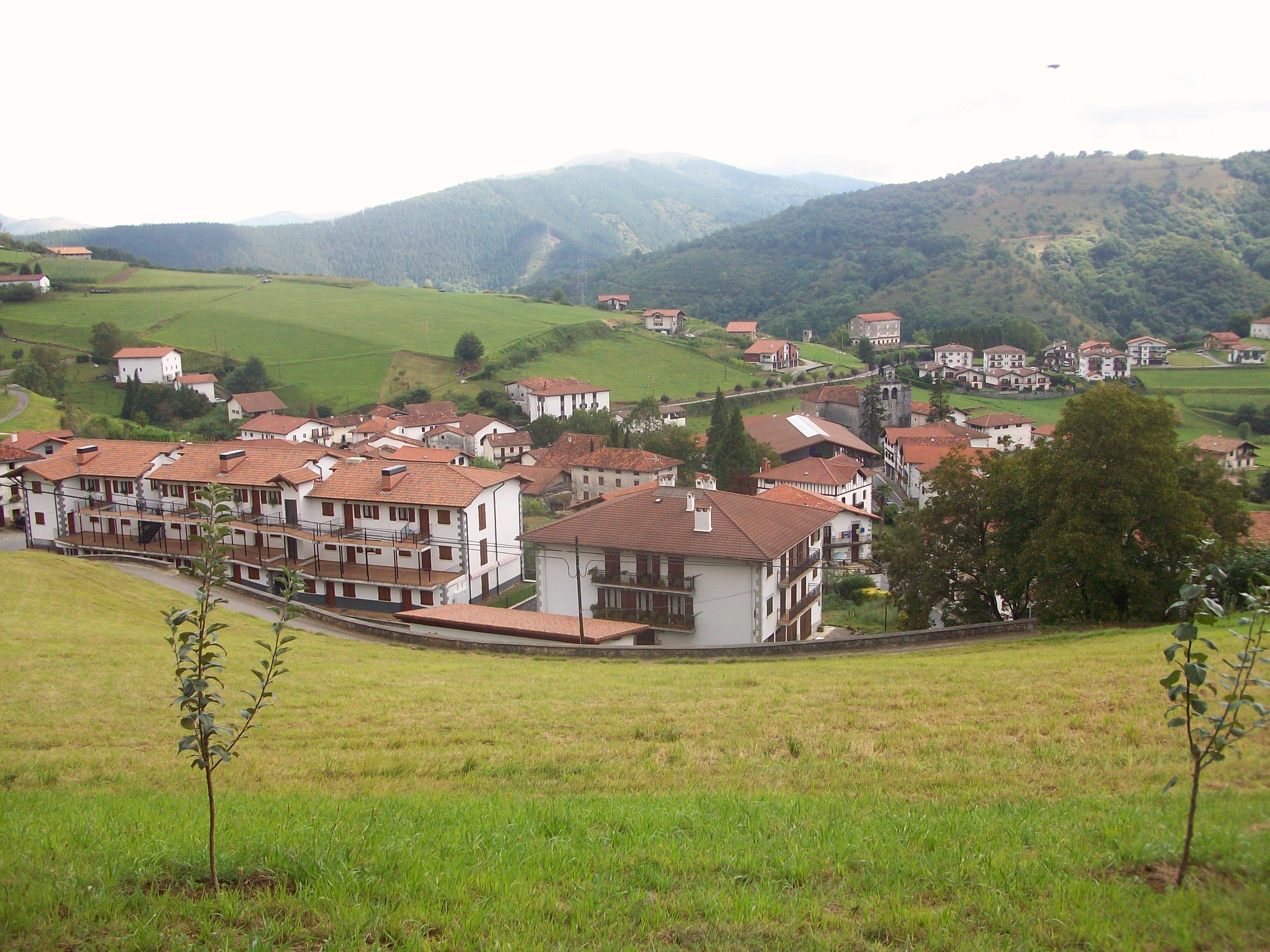 Igantzi. Nafarroa, Euskal Herria - Igantzi. Navarre, Basque Country